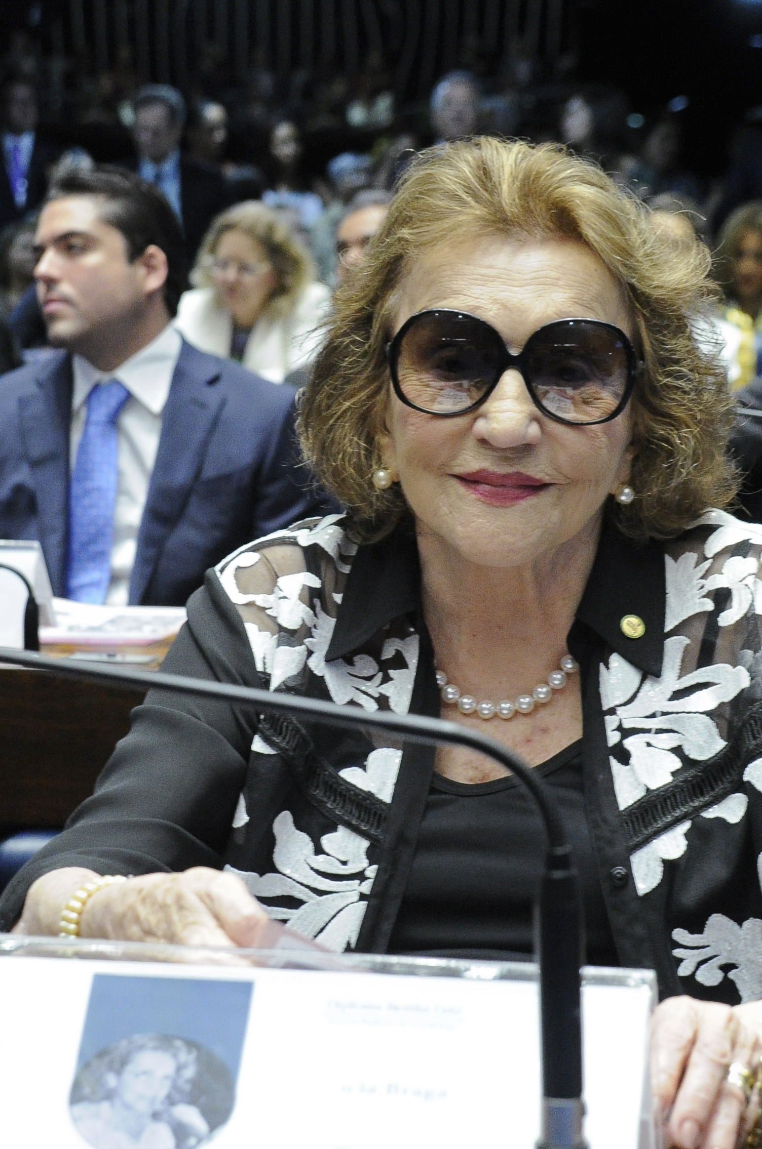 Plenário do Senado durante sessão solene do Congresso Nacional destinada à comemoração do Dia Internacional da Mulher e à entrega do Diploma Bertha Lutz em sua 17ª Premiação. O Diploma Bertha Lutz premia anualmente mulheres e homens que tenham oferecido contribuição relevante à defesa dos direitos da mulher e questões do gênero no Brasil, em qualquer área de atuação. A bancada, vice-presidente da Subcomissão dos Direitos e Garantias Individuais e membro da Comissão da Soberania e dos Direitos e Garantias do Homem e da Mulher, Lúcia Braga (PB). Foto: Geraldo Magela/Agência Senado